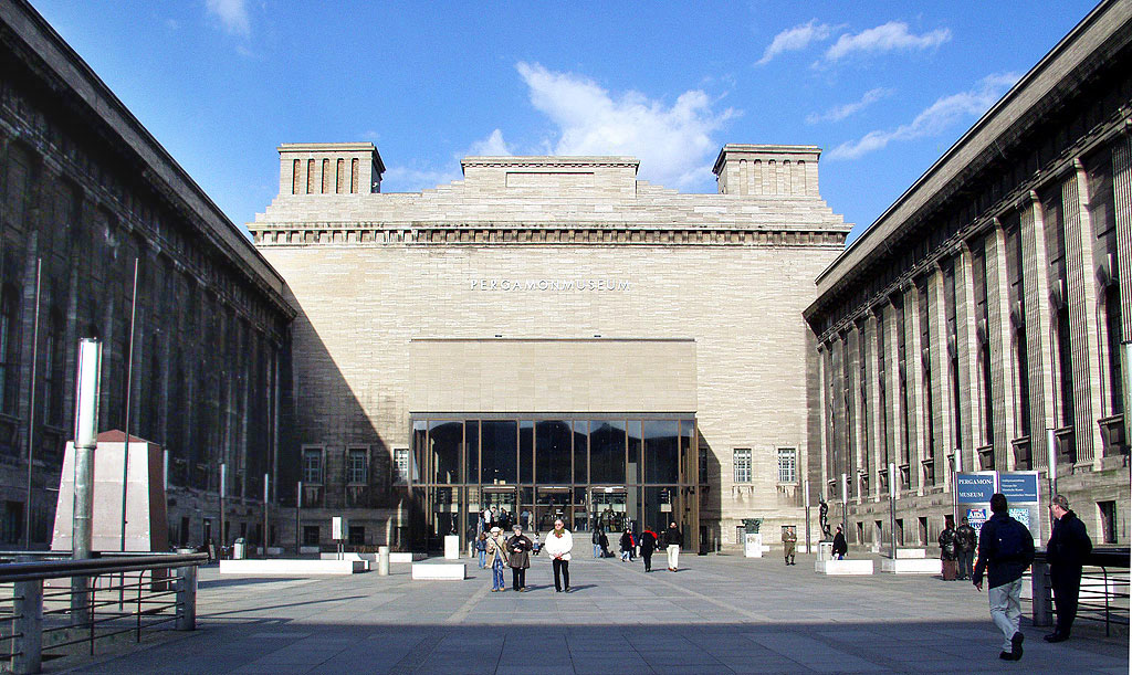 Berlin – Eingangsbereich zum Pergamonmuseum